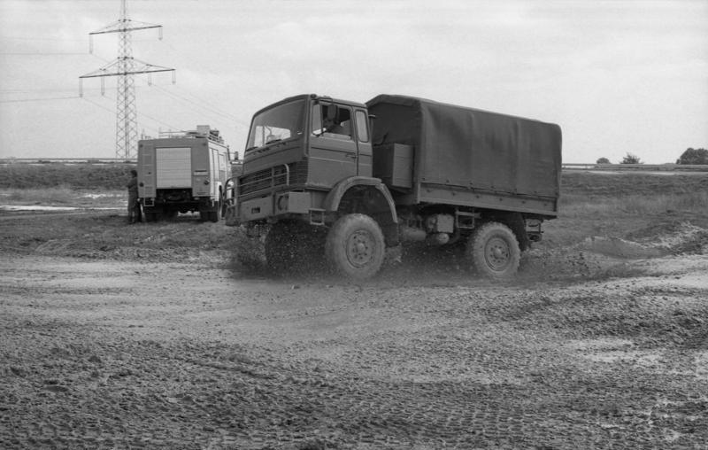 Staatsbesuch des Präsidenten der Demokratischen Republik Sudan, Gaafer Mohamed Numeiri, in der Bundesrepublik Deutschland. Besichtigung des Versuchsgelände der Magirus Deutz AG in Markbronn